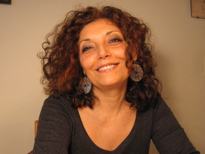 Die argentinische Autorin Alicia Kozameh (*1953)